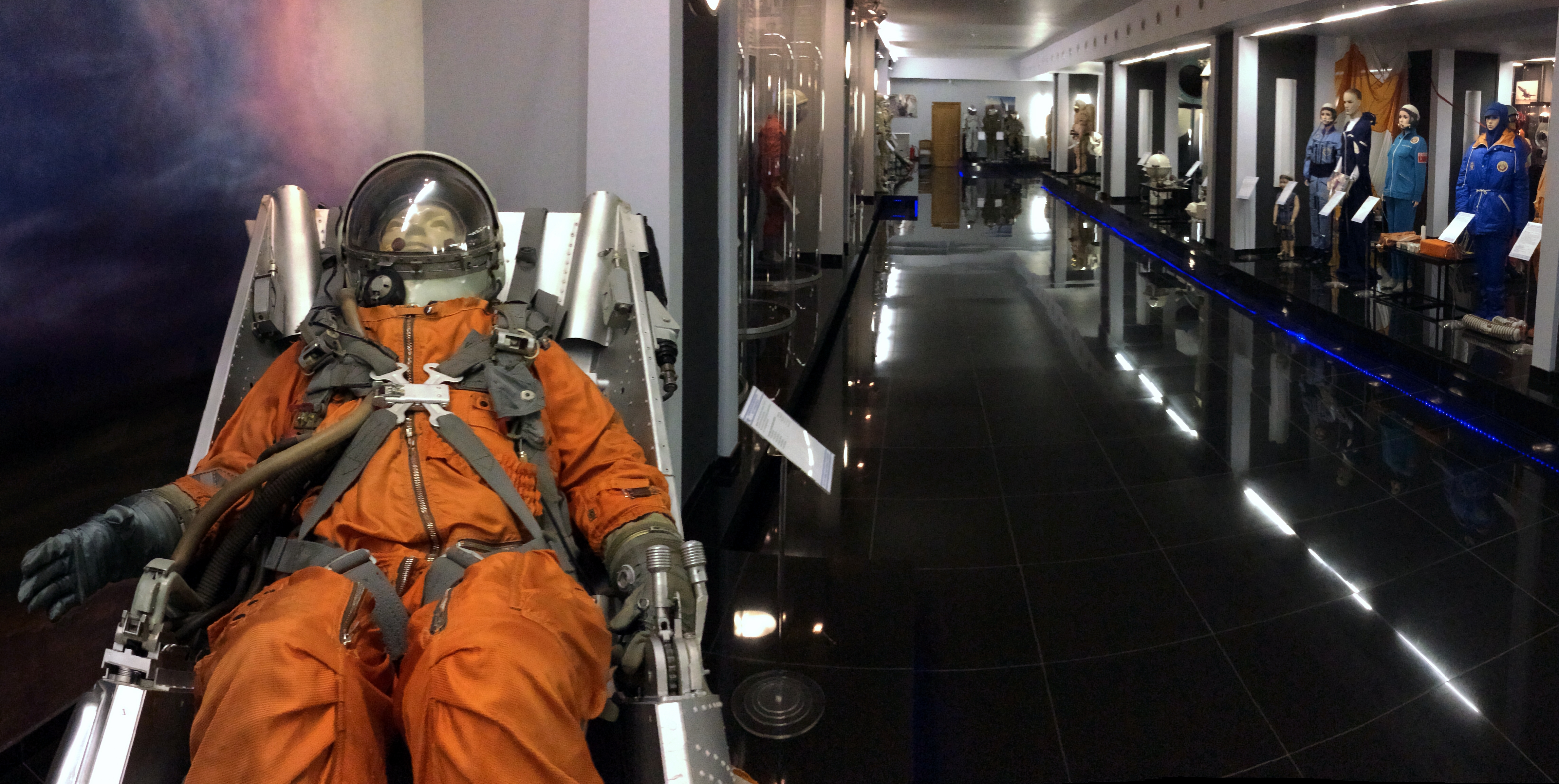 Демонстрационный зал продукции Научно-производственного предприятия «Звезда» им. Г. И. Северина